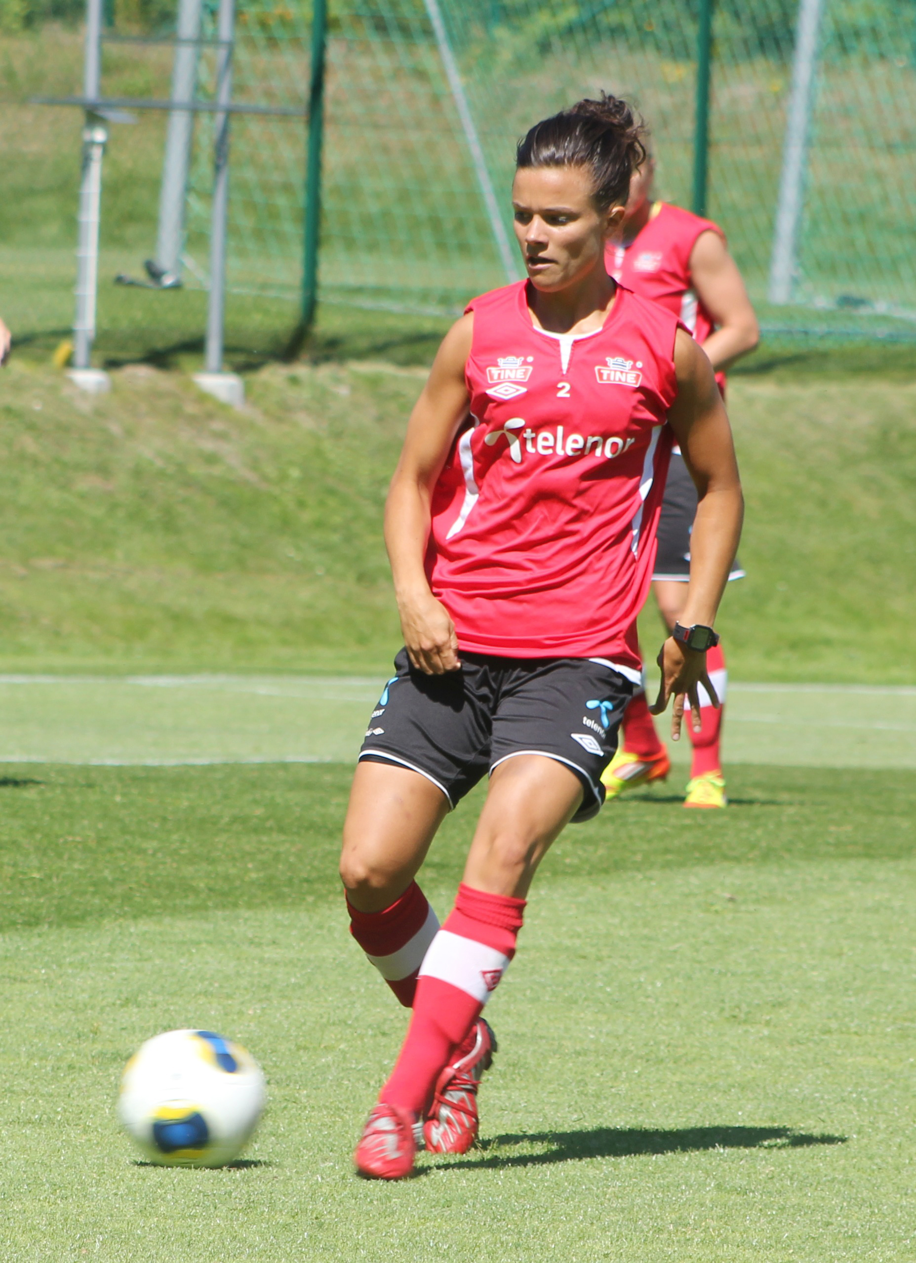 Cathrine Høegh Dekkerhus spelar på Gröndals IP i samband med UEFA Dam-EM 2013.